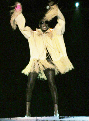 Grace JonesTivoli Gardens, Copenhagen, Denmark